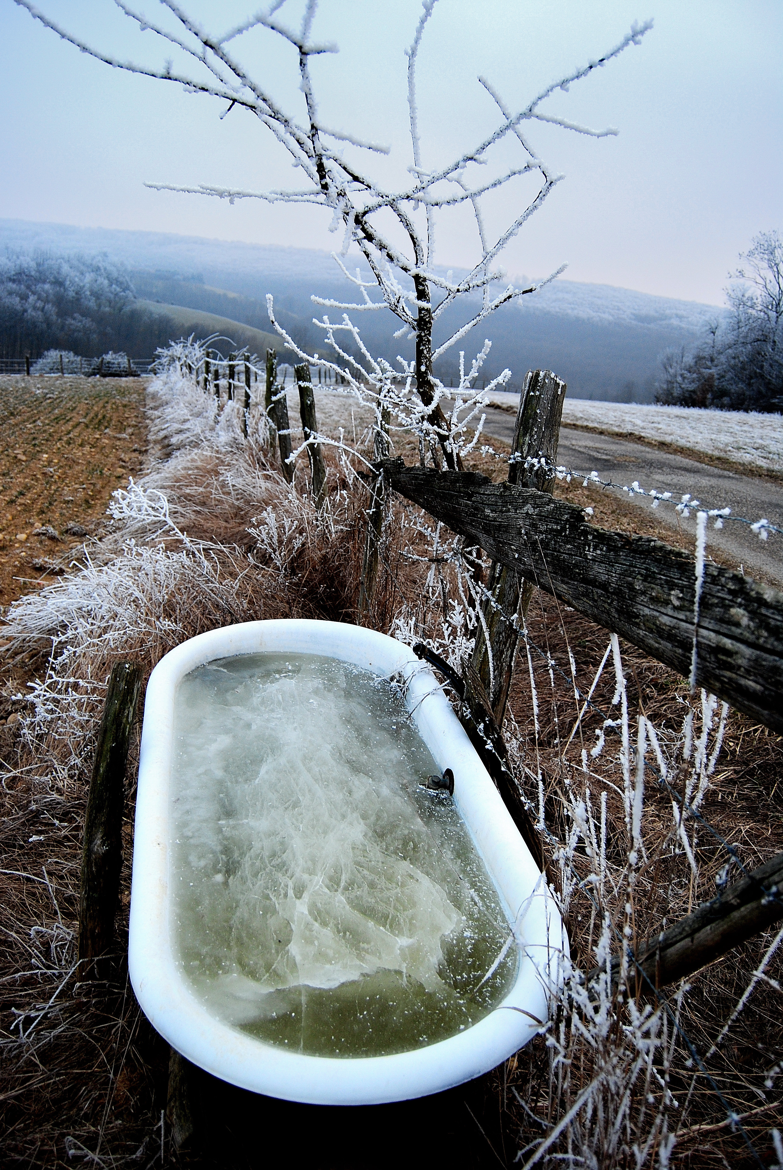 Plateau de Chambaran, Roybon, Isère